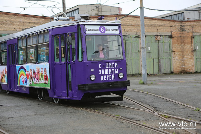 Трамвай ЛМ-93 № 306 на территории трамвайного депо Владивостока